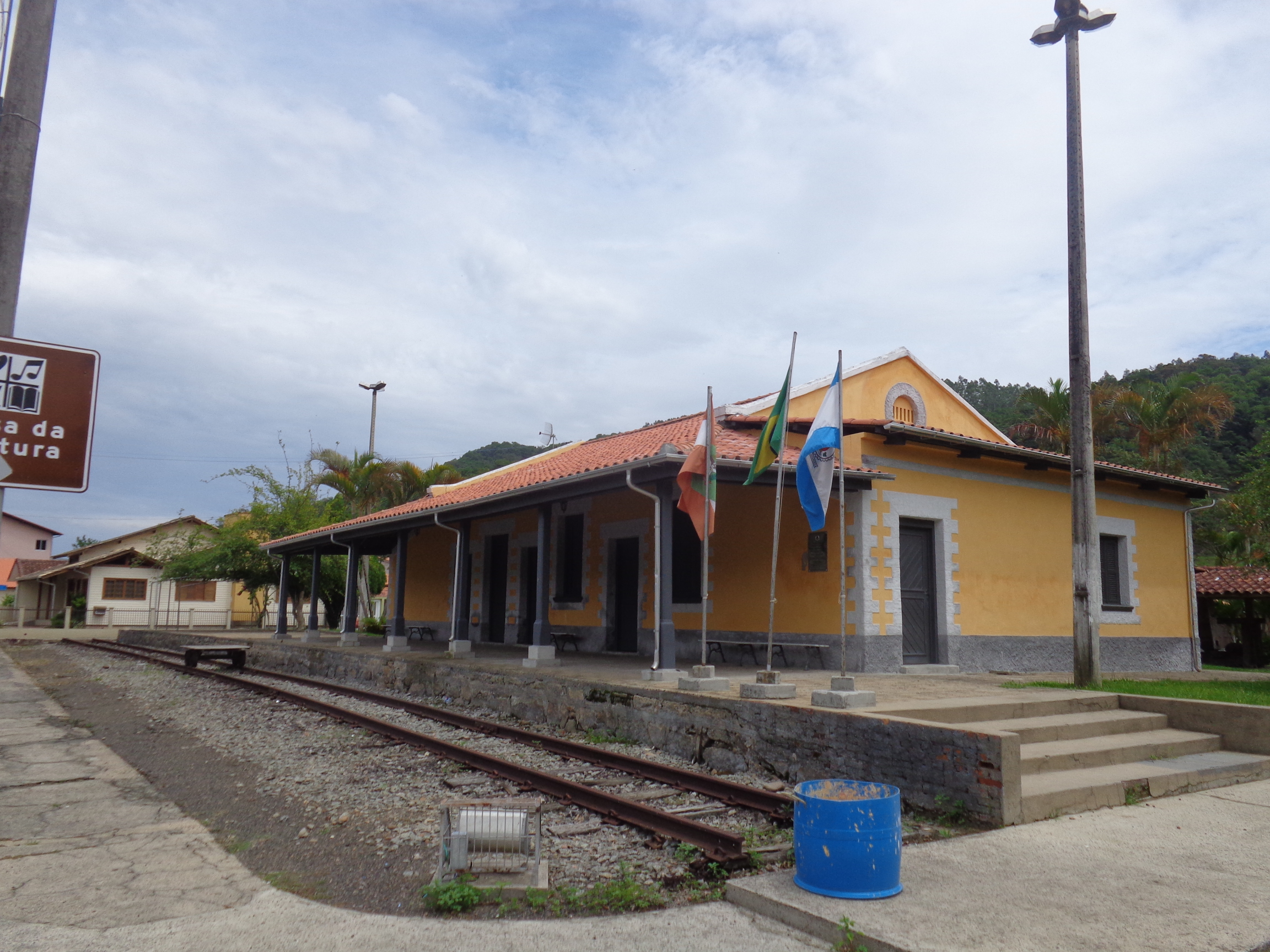 Estacão Ferroviária da EFDTC de Pedras Grandes. Desativada desde a enchente de março de 1974